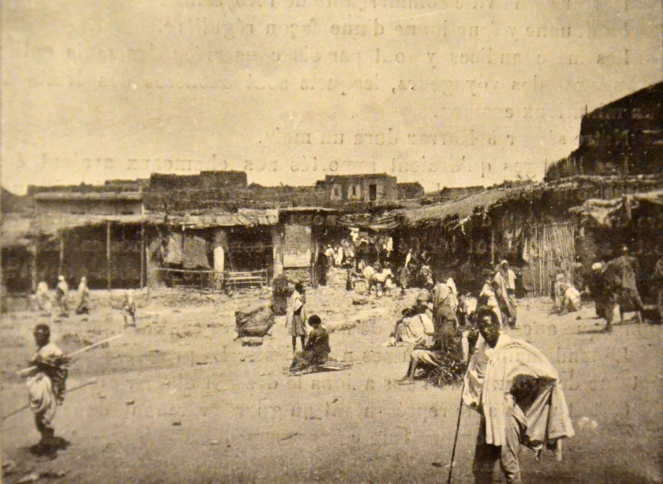 Photo ancienne, légendée "La place de Harrar", dans un article de la "Revue illustrée" (Tome relié 1902) consacré à l'Abyssinie